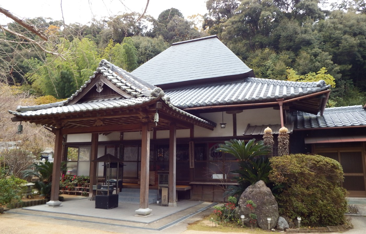 長谷寺の本堂